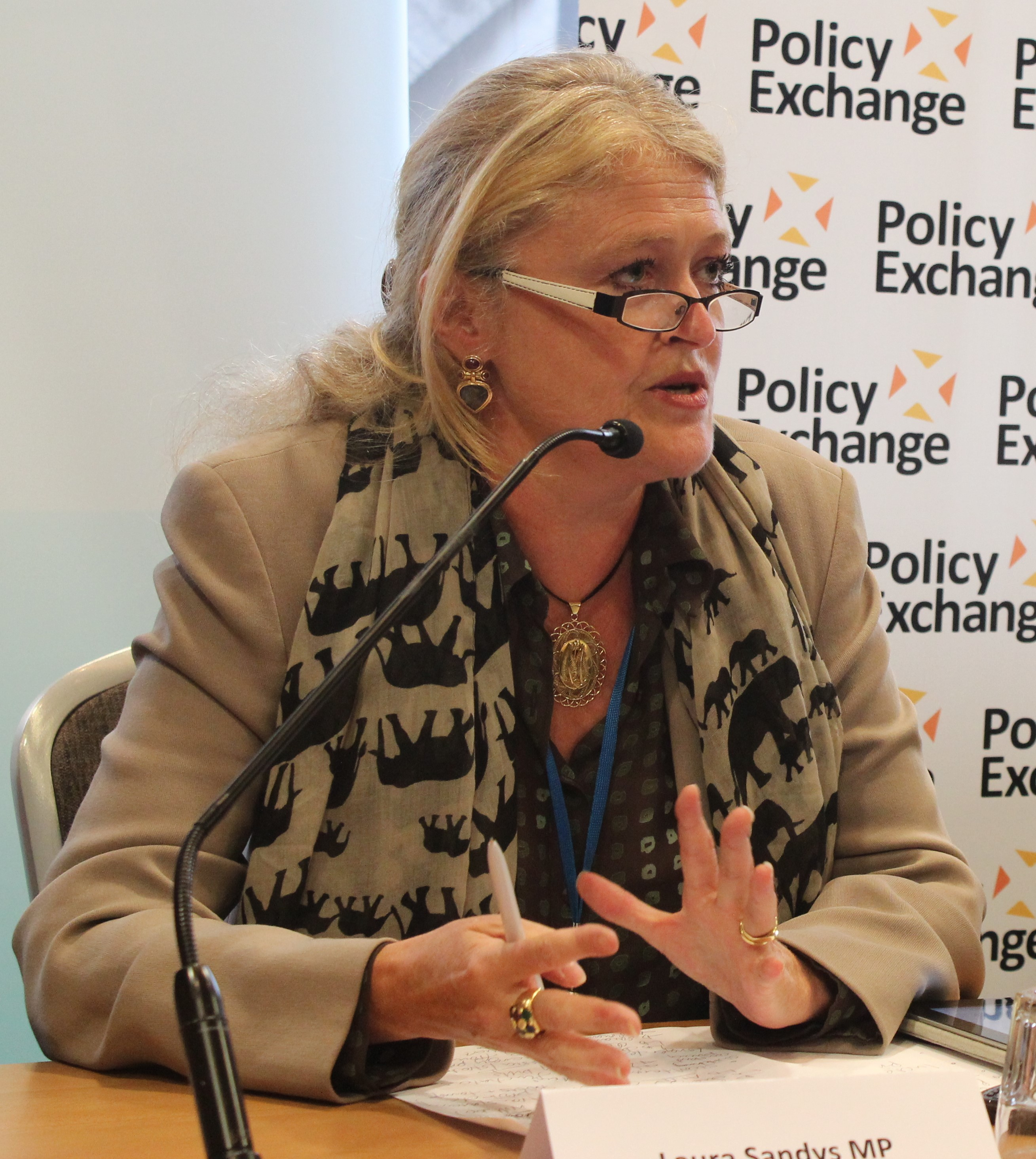 Laura Sandys